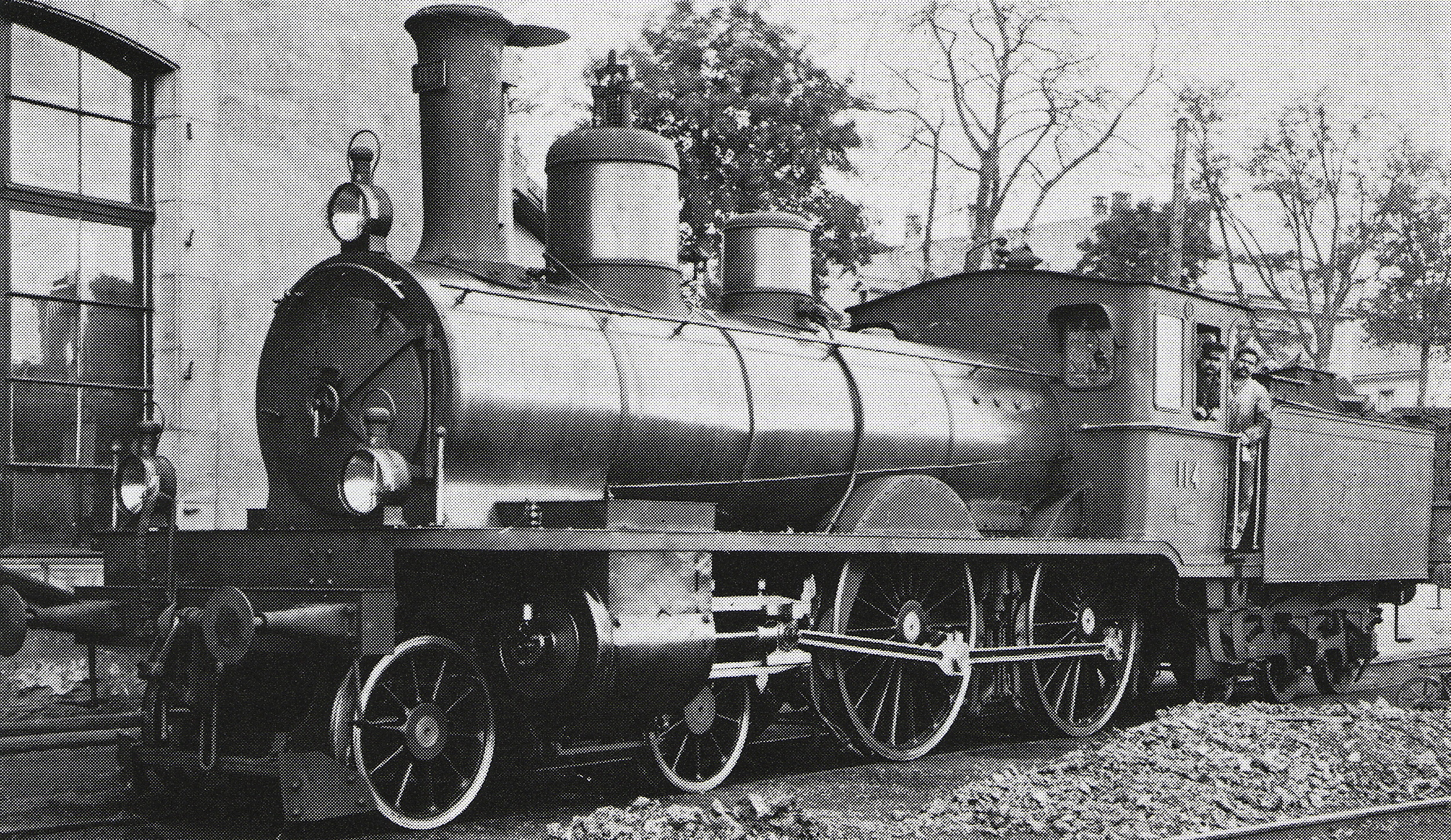 Schnellzuglocomotive A 2/4 Nr. 114 der Schweizeriſchen Bundesbahnen, 1903 übernommen von der Jura-Simplon-Bahn, gebaut 1893 inn der Schweizeriſchen Locomotiv- und Machines-Fabrique zů Winterthur (Fabricationsnr. 785); 1917 an die Militaire-Eiſenbahn-Generaldirection Warſchau als P42, 1919 an die Lettiſche Staatsbahn als An 28, 1923 an die Polniſche Staatsbahn als Typ Od, zwiſchen 1927 und 1931 abgebrochen.